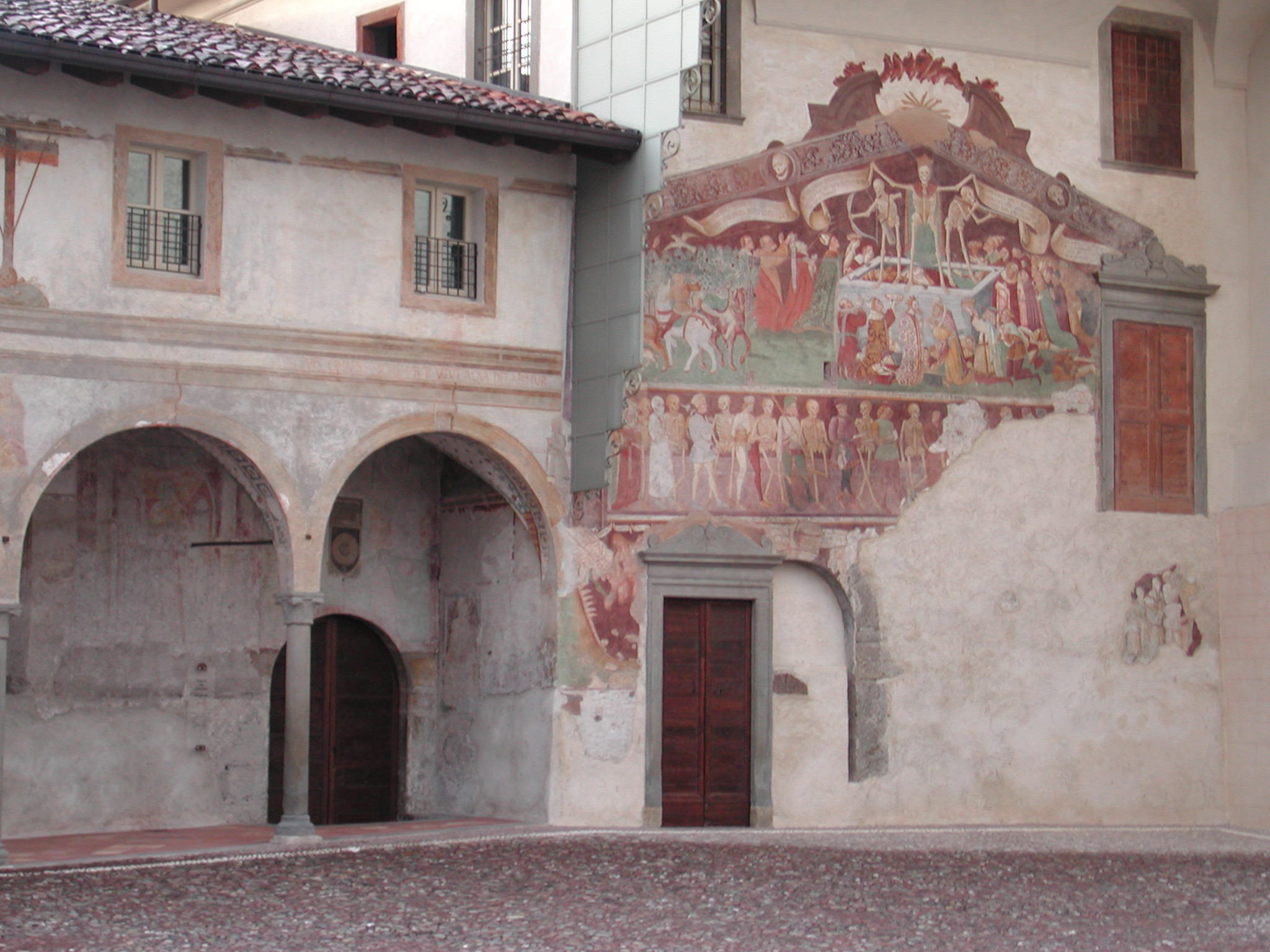 Clusone, Provincia di Bergamo, Italy Oratorio dei disciplini - Danza macabra e Trionfo della Morte - Triumph of Death Foto fatta da me, ottobre 2005